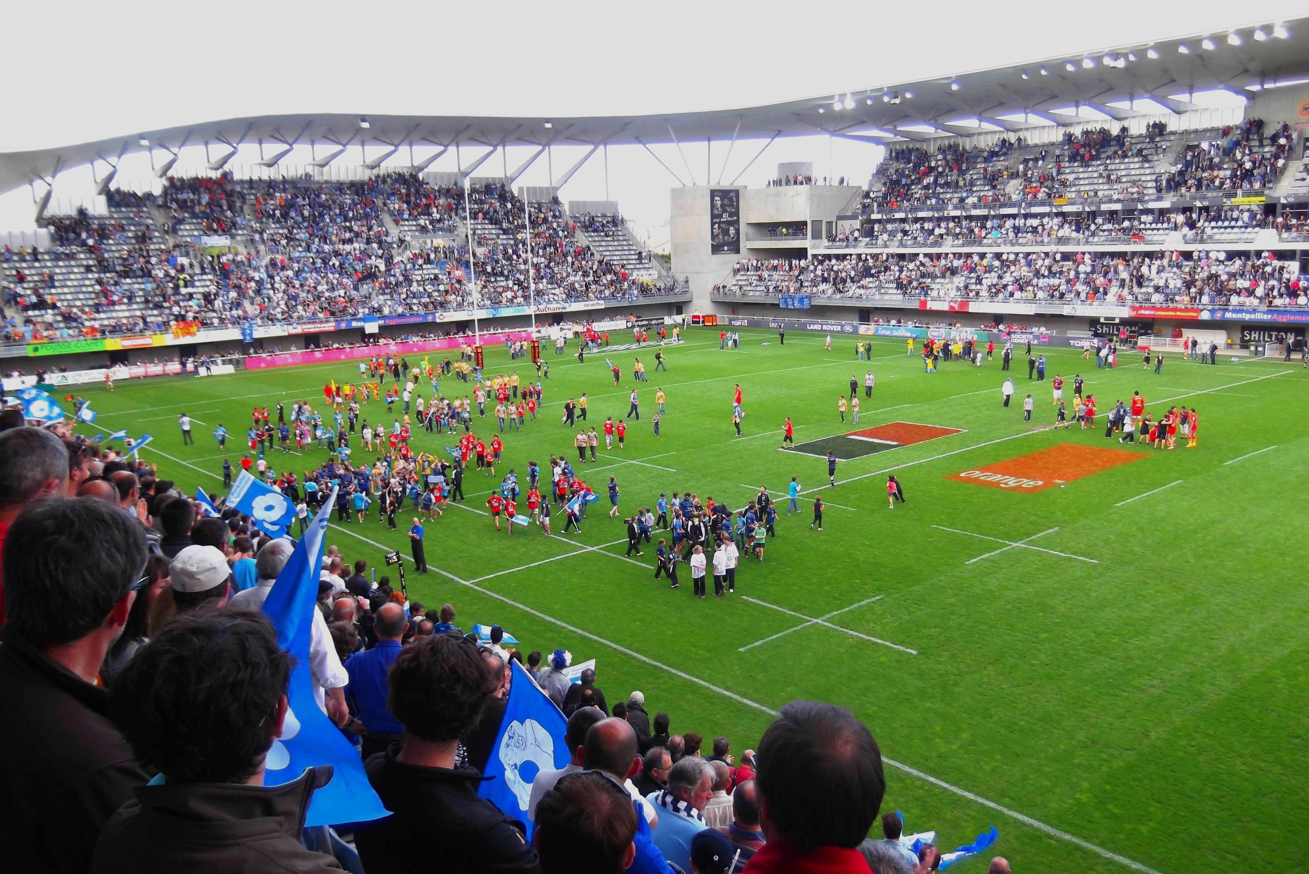 MHR vs USAP, 4 mai 2013.